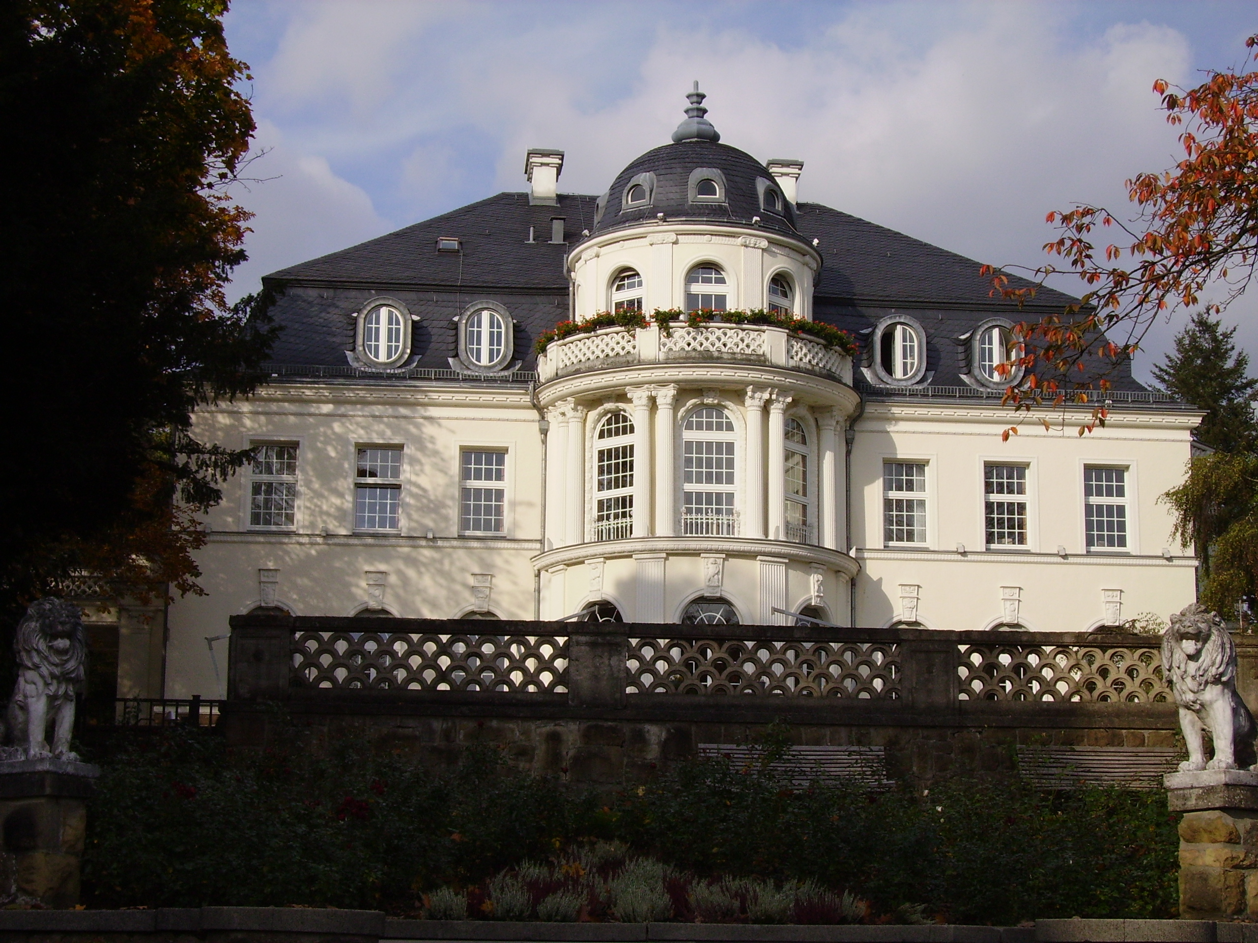 Villa Dürkopp in Bad Salzuflen (Altersruhesitz)